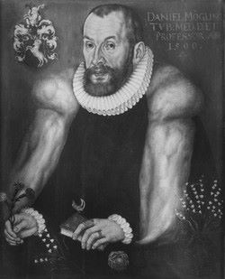 Prof. Daniel Mögling, Gemälde in der Professorengalerie Tübingen